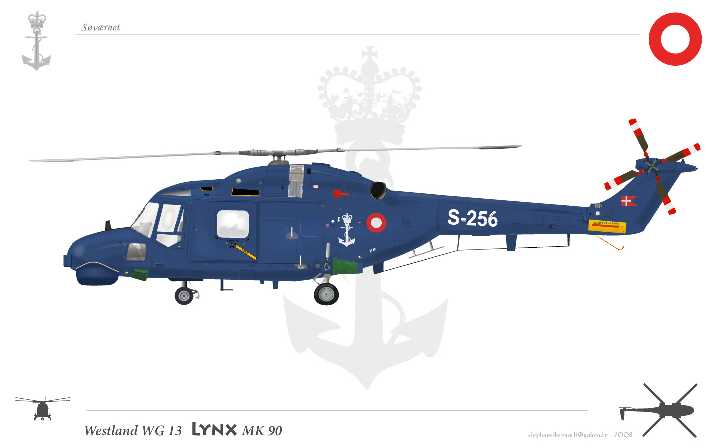 westland Lynx Danish Marine